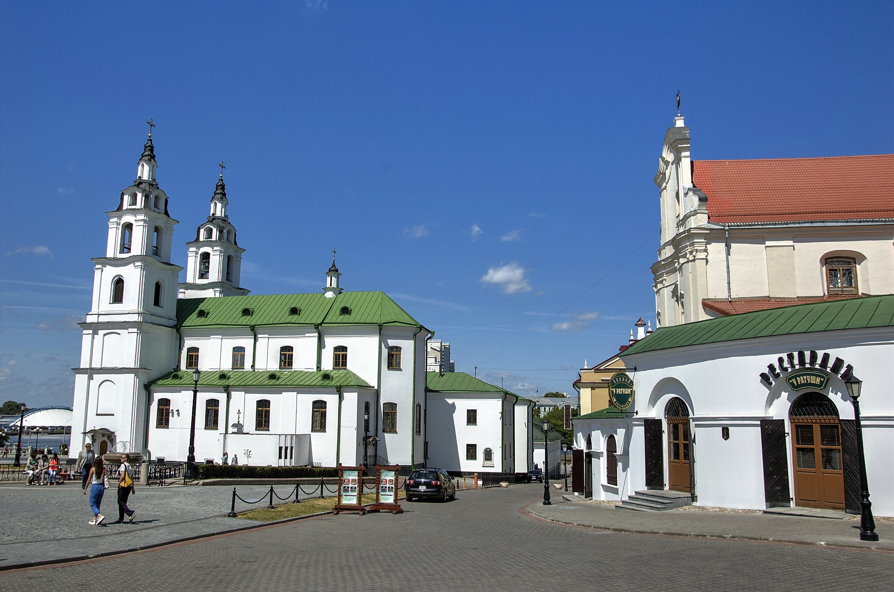 Беларуская (тарашкевіца): Касьцёл Зьвеставаньня Найсьвяцейшай Панны Марыі (Менск)